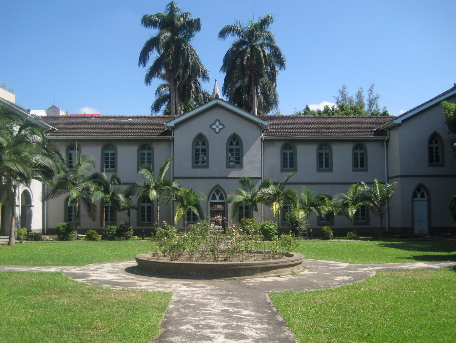 台南神學院本館背面